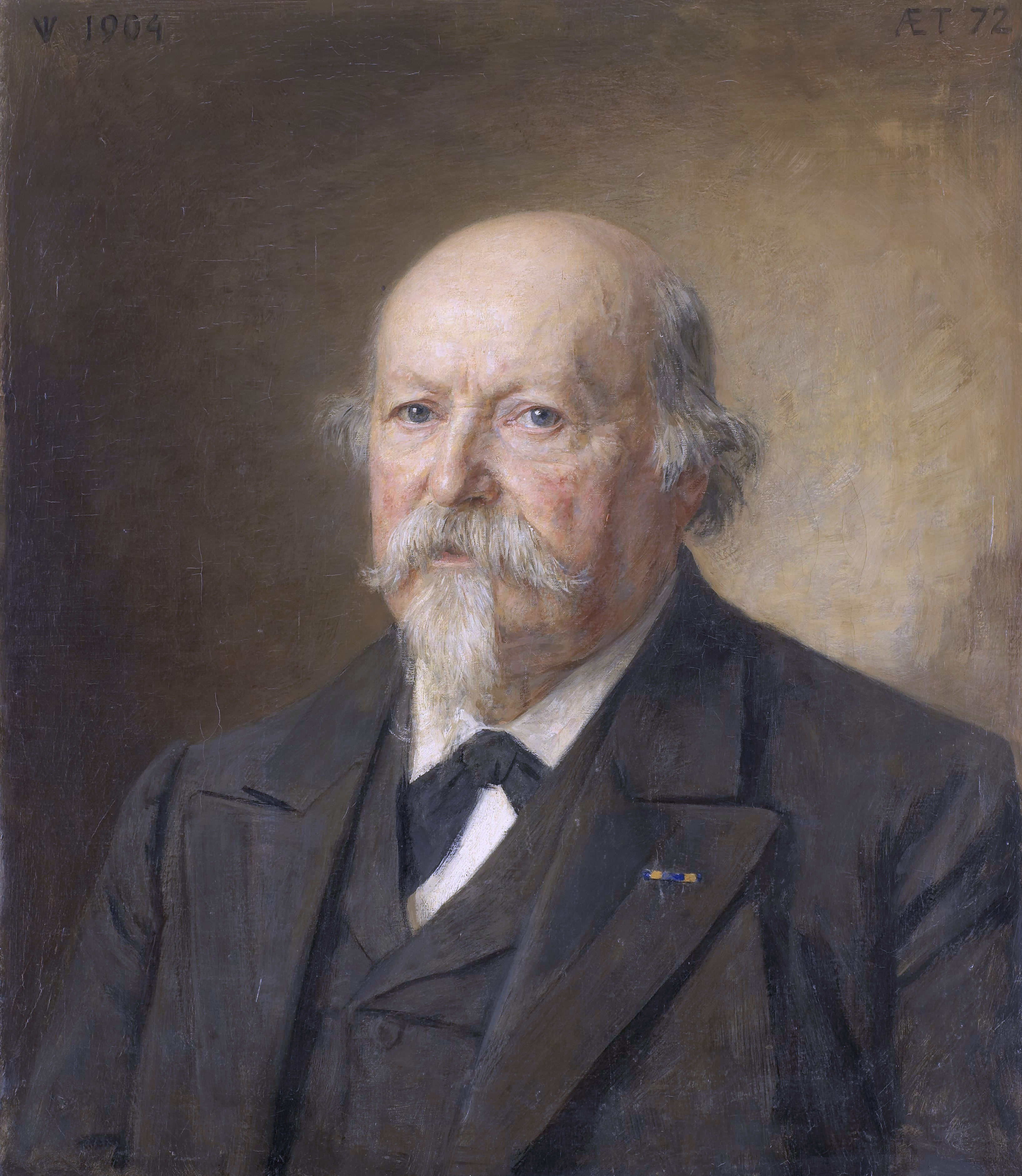 Johan Philip van der Kellen (1831-1906). Directeur van het Rijksprentenkabinet (1876-96) oil on canvas 65 × 56 cm 1904 signed t.r.: 'JV 1904 AET 72